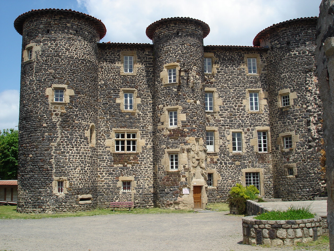 Le Monastier-sur-Gazeille, comm. de la Haute-Loire, France, région Auvergne. Façade d'entrée du château.